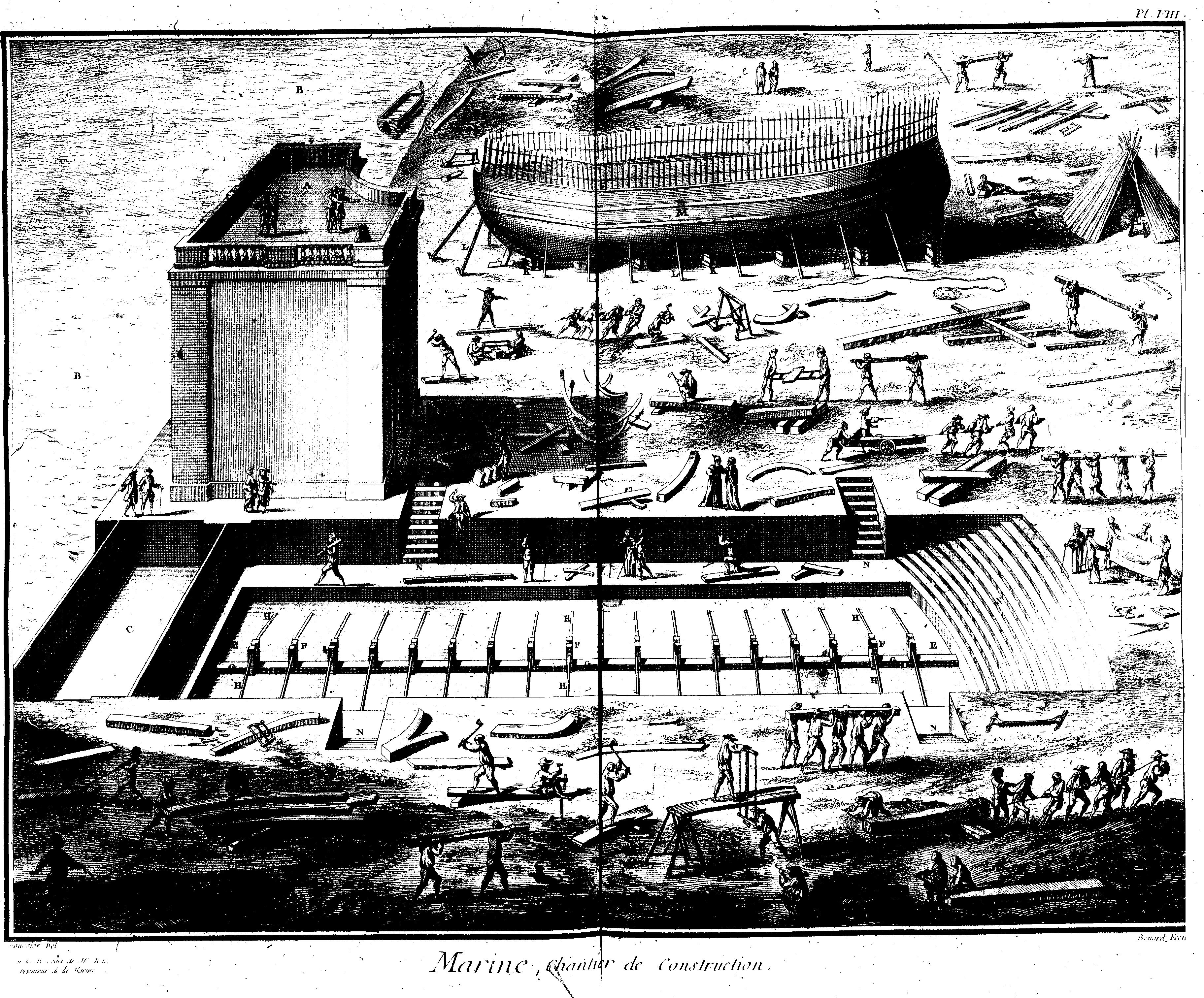 Planches de l'Encyclopédie de Diderot et d'Alembert, volume 6